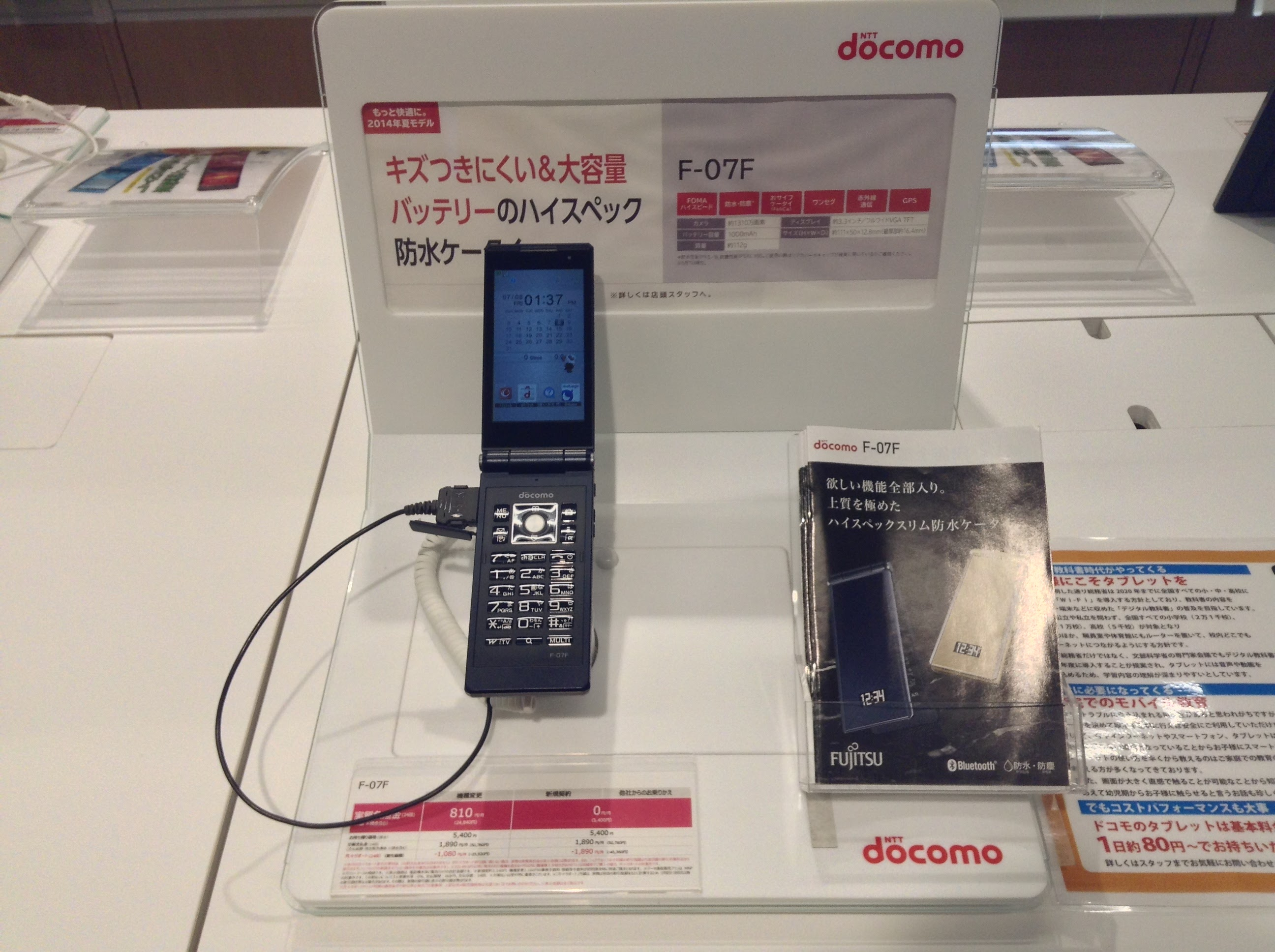 F-07F ホットモック（黒）